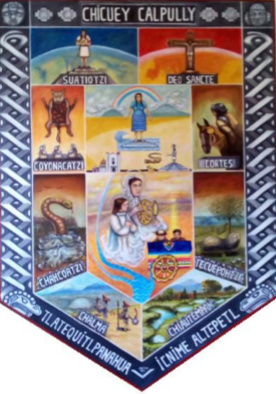 Escudo de armas de la ciudad de Chiautempan